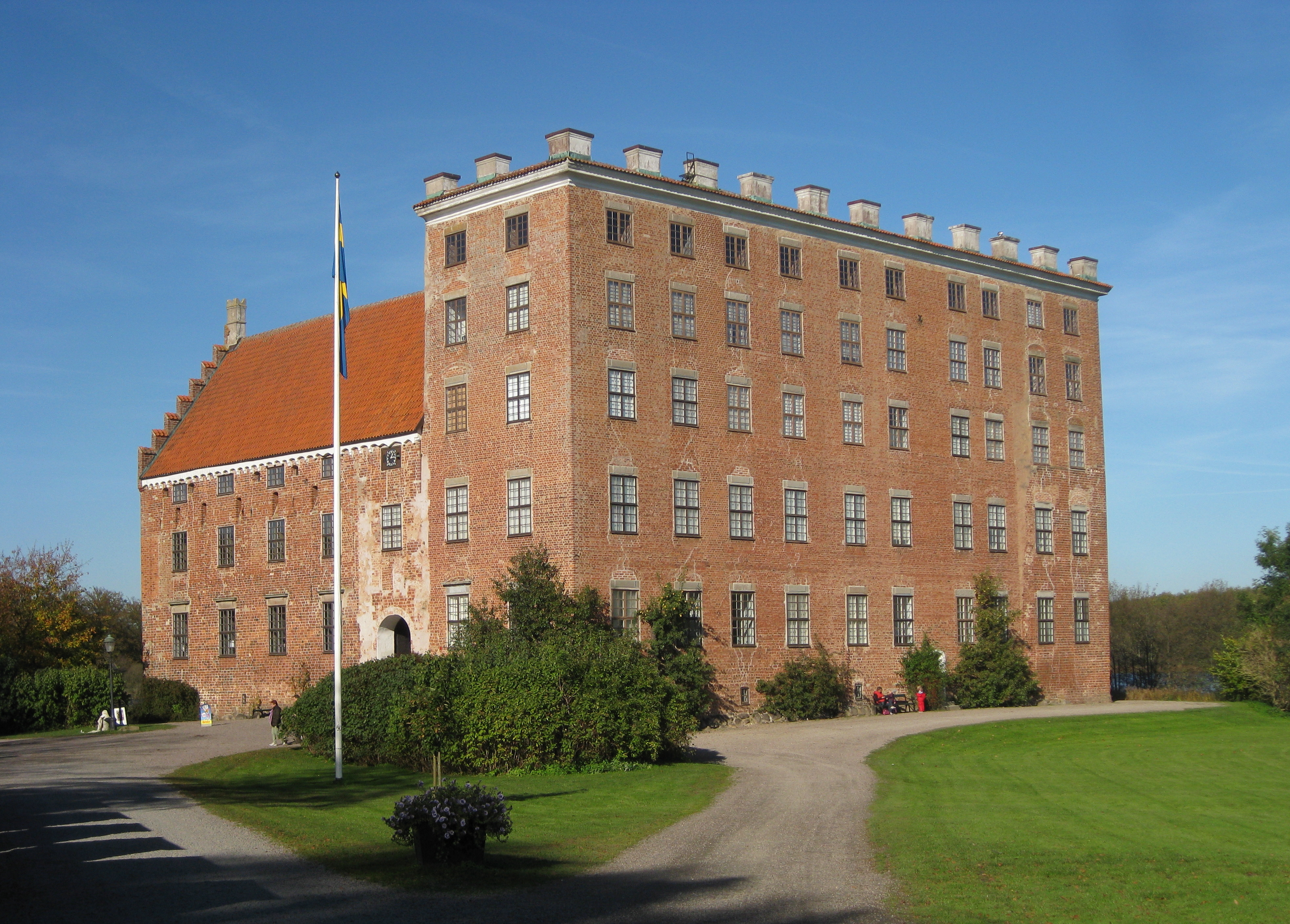 Svaneholms slott i Skåne